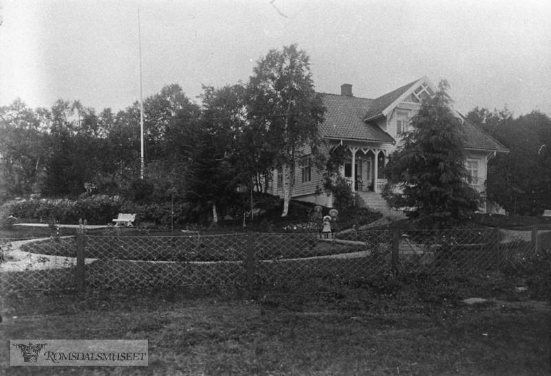 Breidablik 1888 med hagen